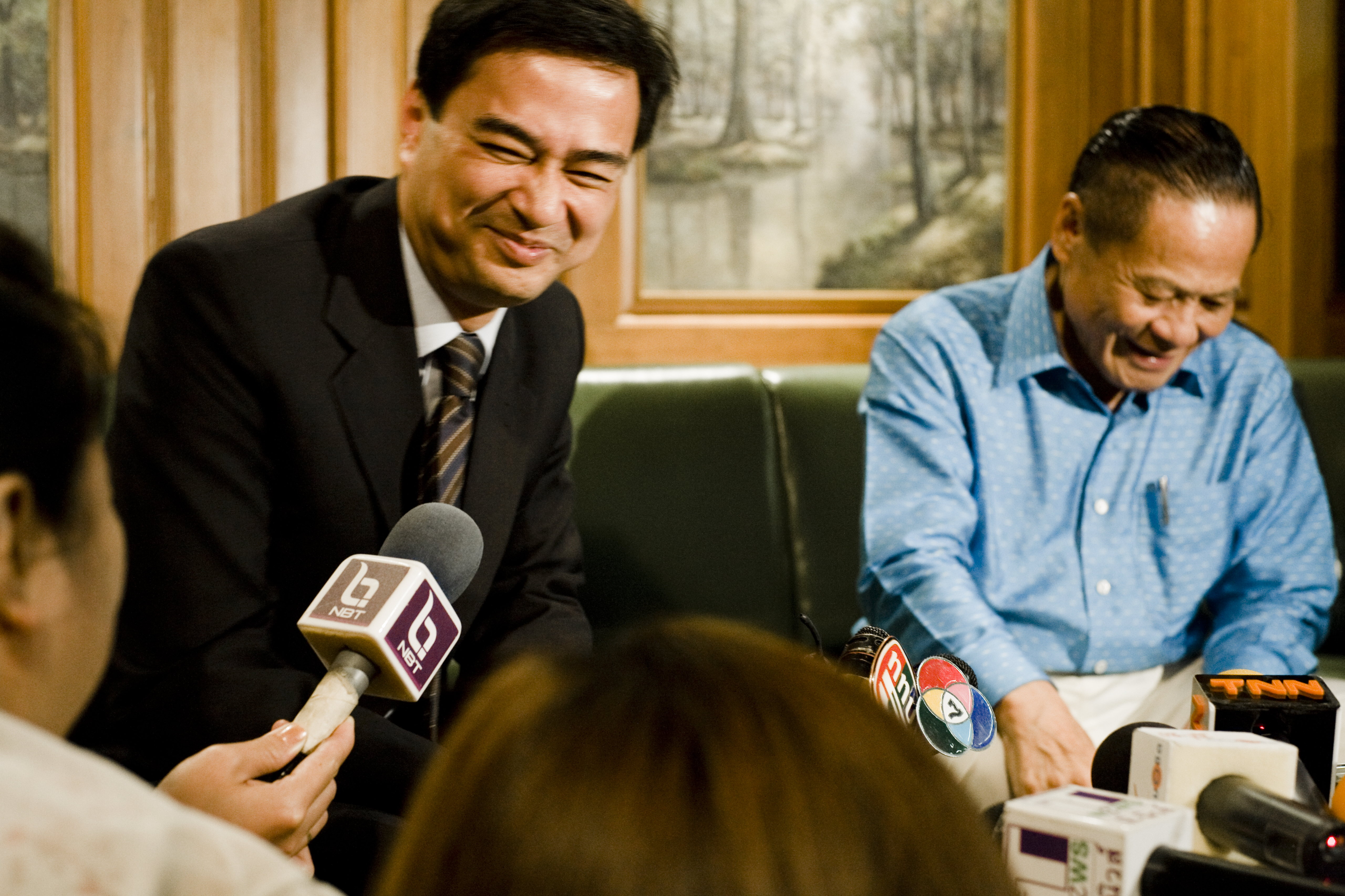 นายกฯ อวยพรวันเกิดคุณบรรหาร ศิลปอาชา ณ บ้านพัก 19สิงหาคม2552 (The Official Site of The Prime Minister of Thailand Photo by พีรพัฒน์ วิมลรังครัตน์)